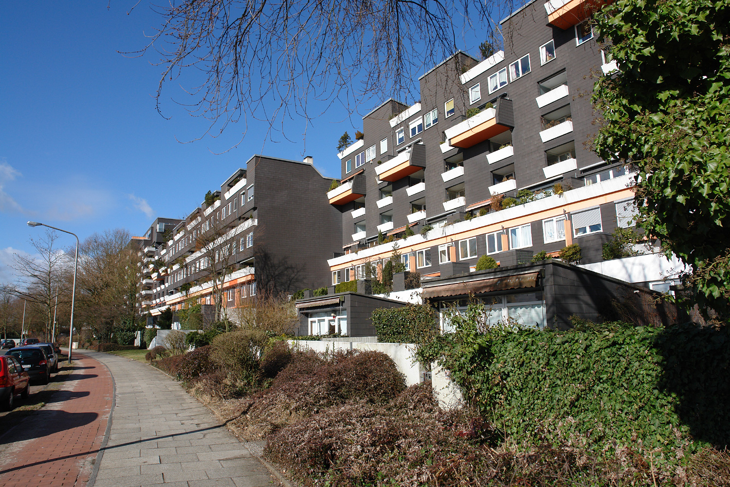 Bremen-Vahr: Teilansicht der Großwohnanlage „Großer Kurfürst“, hier an der Eislebener Straße.